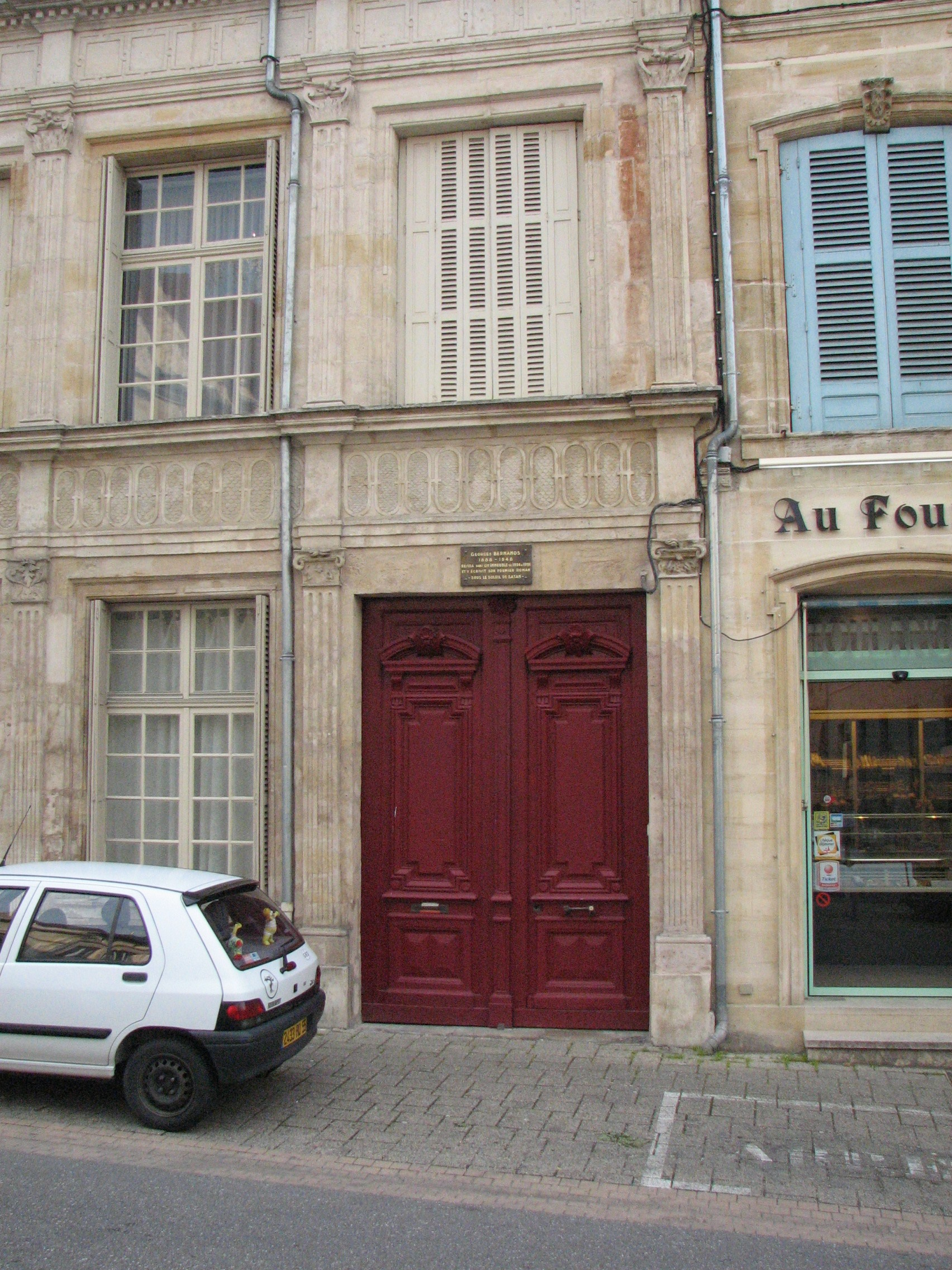 Maison où Georges Bernanos a vécu et écrivit son premier roman Sous le soleil de Satan, rue des Ducs de Bar, Bar-le-Duc, comme indiquée sur la plaque au dessus de l'entrée